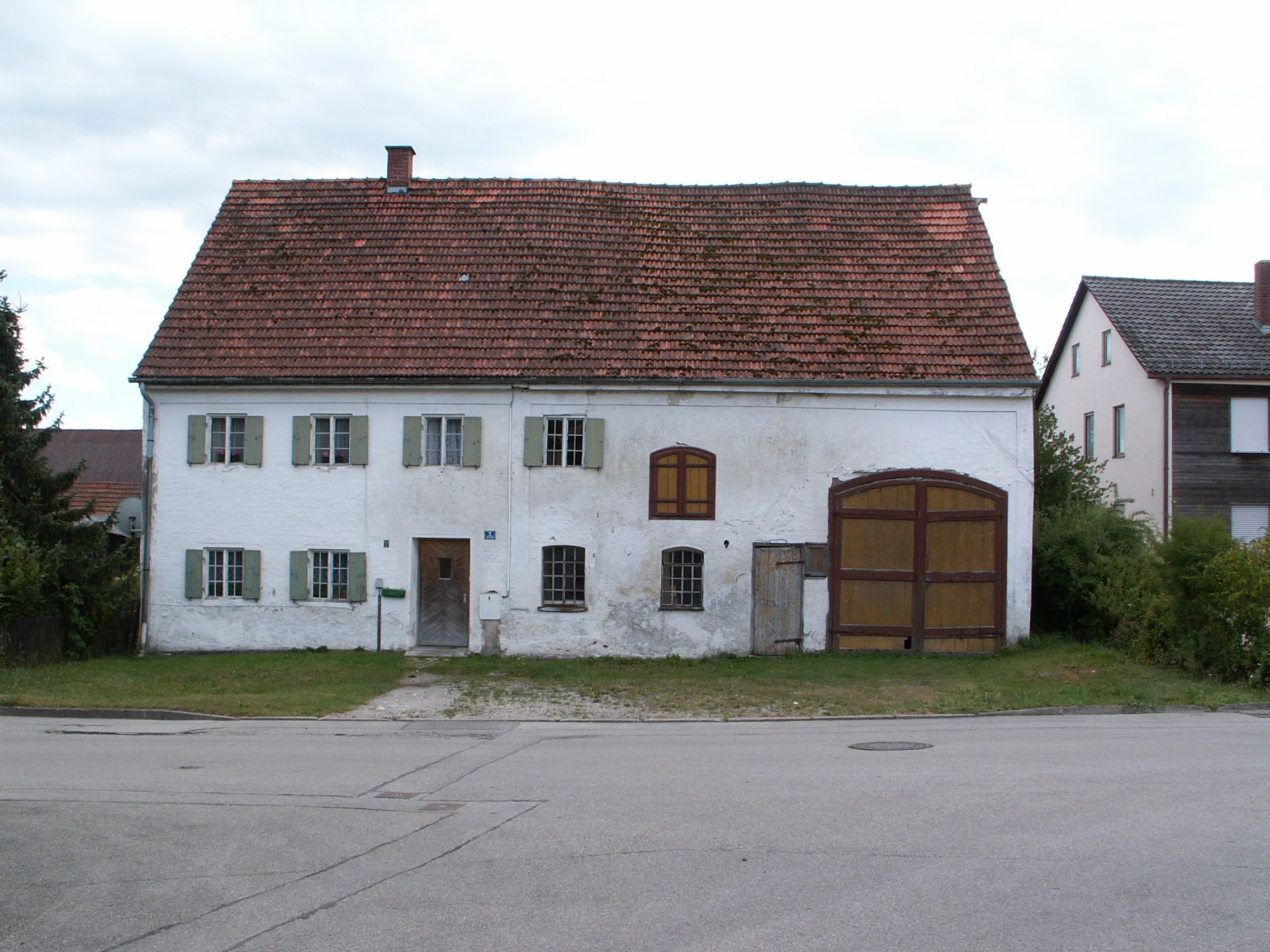 Bauernhaus Dorfstr. 5 in Kottgeisering (2006)